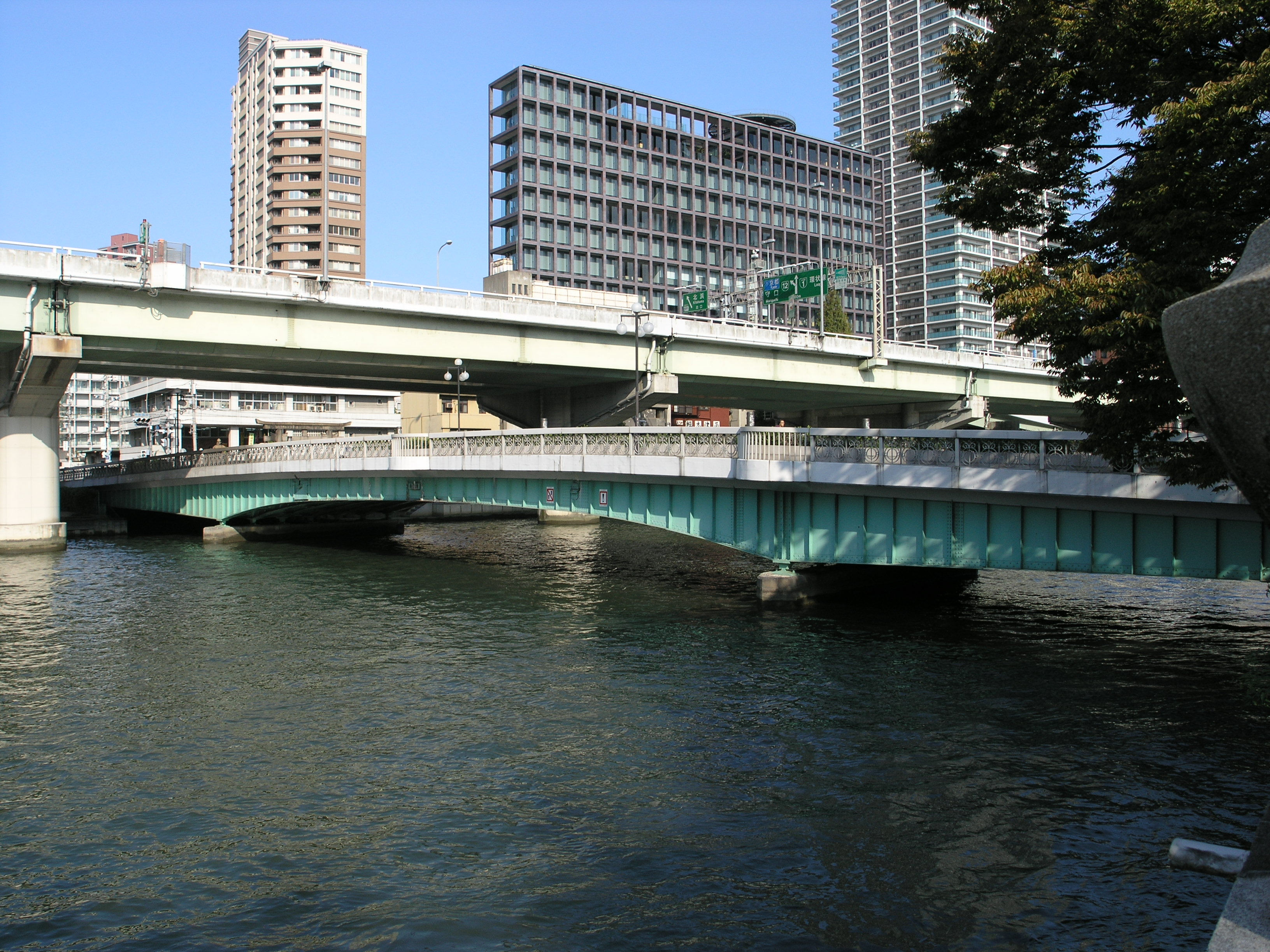 鉾流橋（大阪市北区） 2008年10月撮影。 機材：C8080WZ 撮影者：Kansai explorer